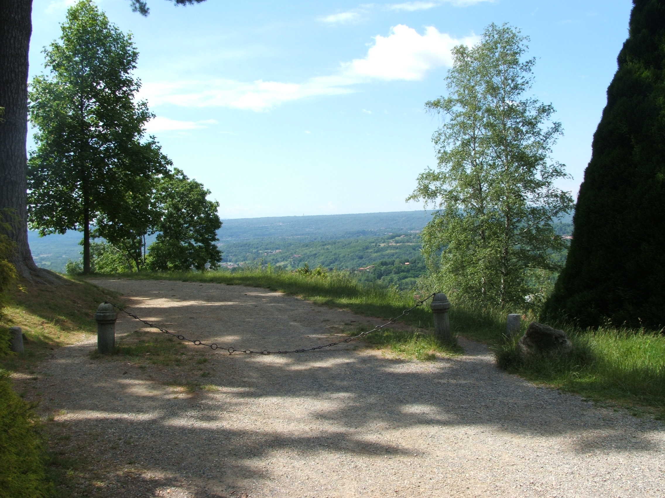 Parco della Burcina, Biella, Piemonte, Italia - il bosco